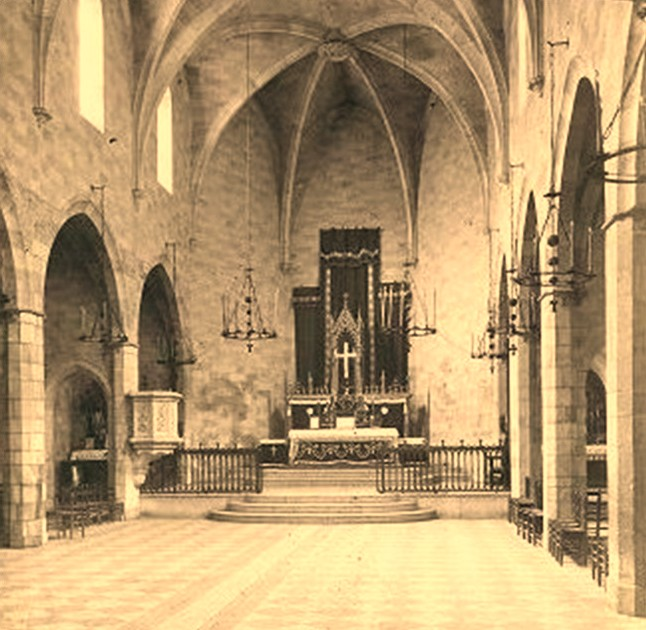 Església gòtica de Sant Antoni Abat de Barcelona 1446-1936